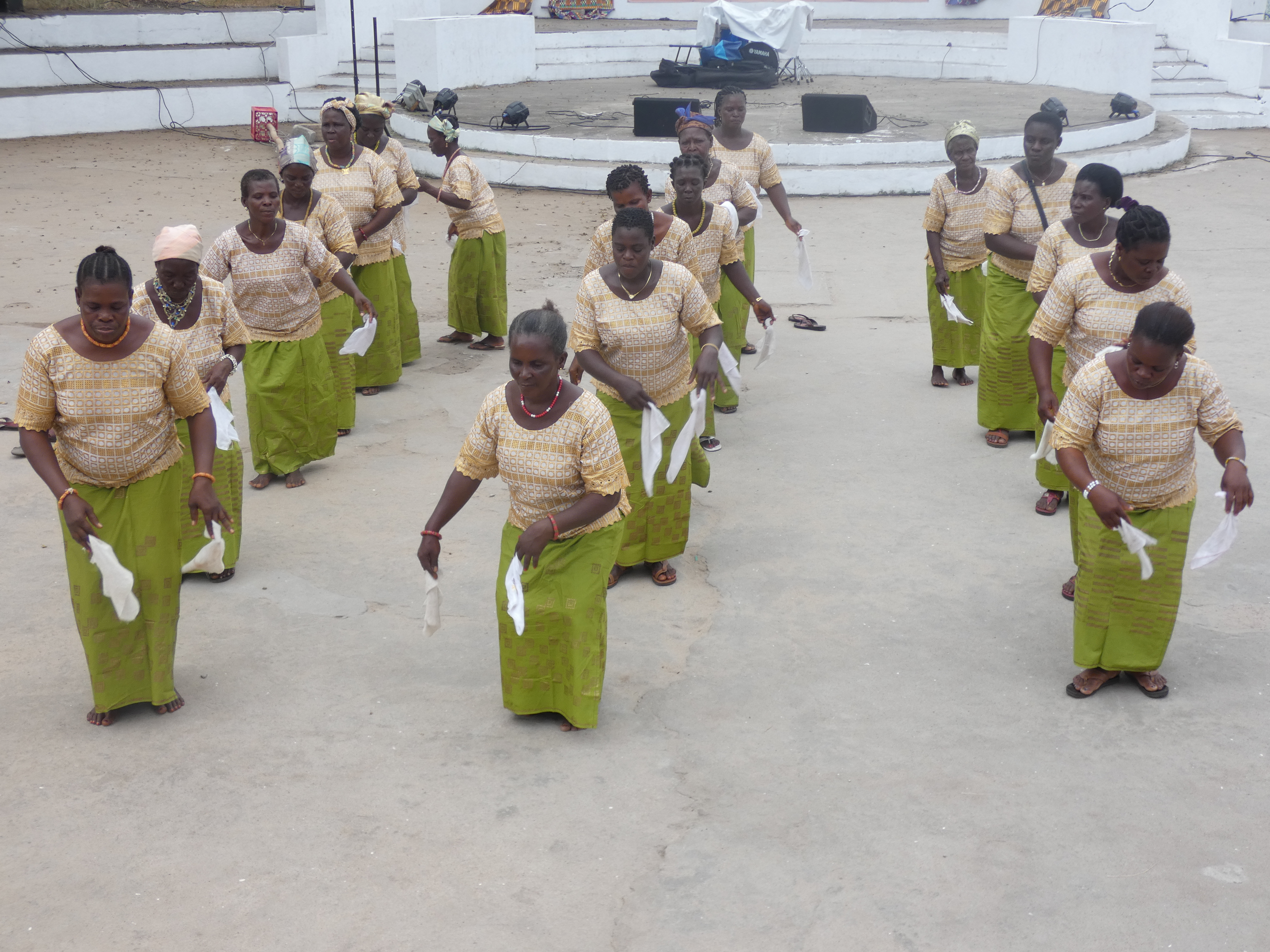 Femmes de Jacqueville dansant lors du Festival des 3A This is an image with the theme "Africa on the Move or Transport" from: Ivory Coast